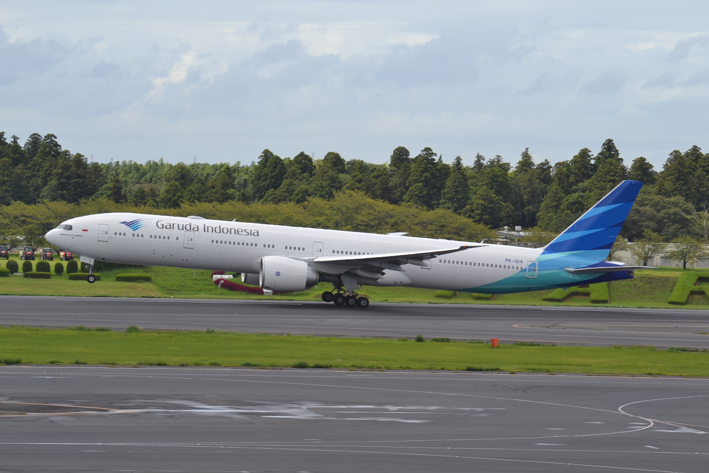 Boeing 777/3 of Garuda Indonesia Airlines departing Tokyo Narita-NRT,Japan,04/09/13.